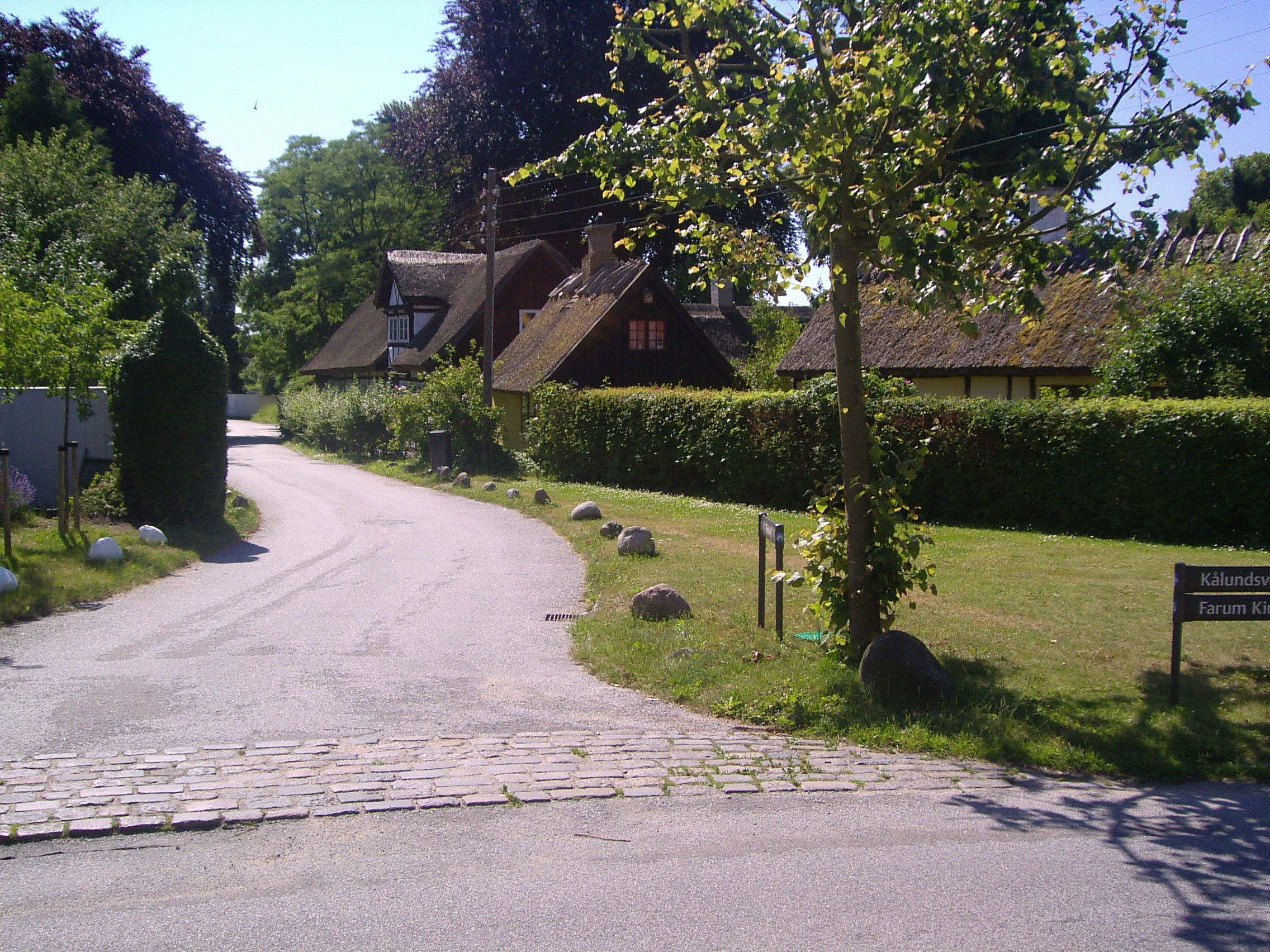 Farum Landsby